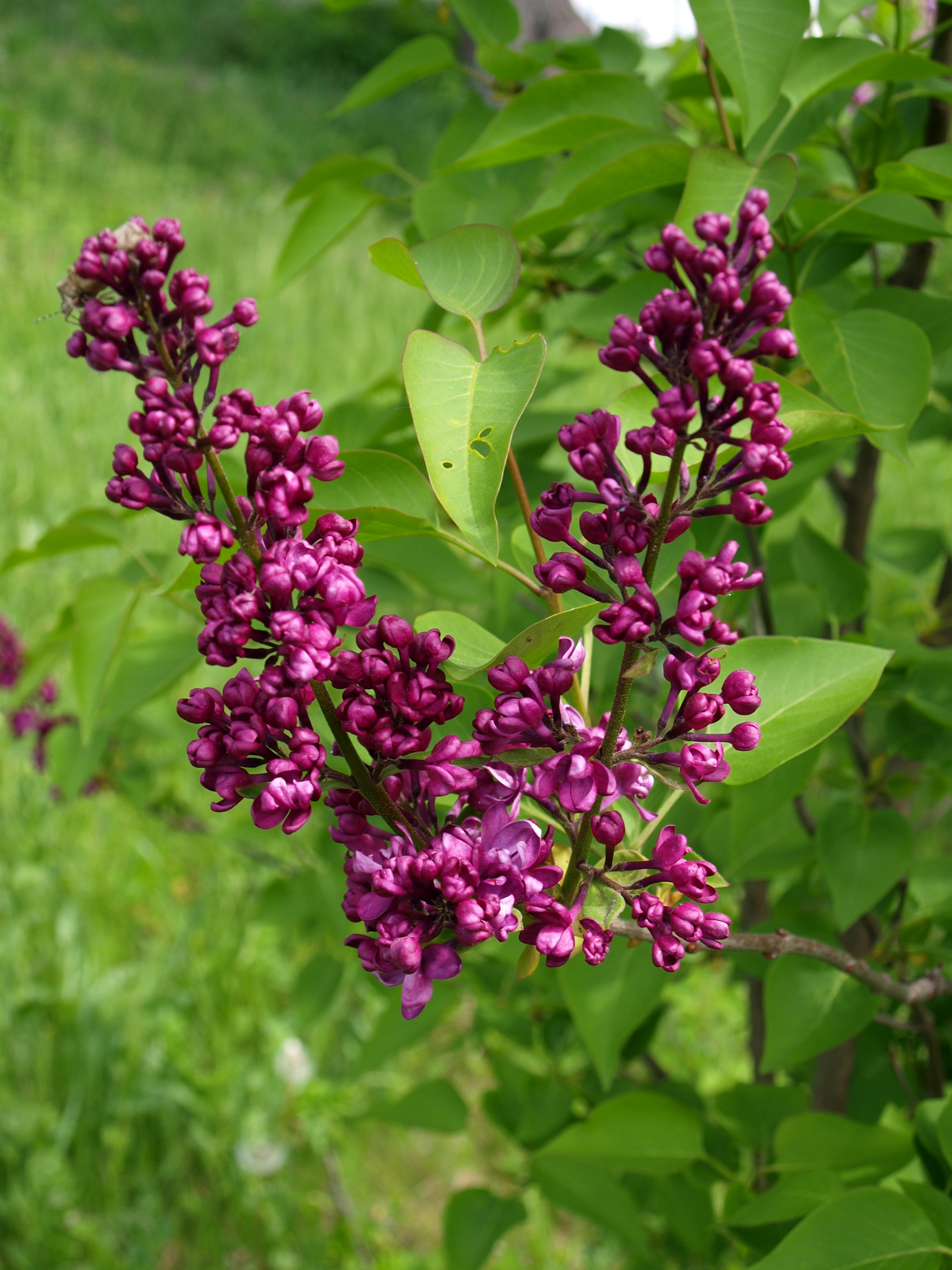 Syringa, Полтава, вул. Ф.Моргуна, 16. Ботанічний сад Полтавського національного педагогічного університету